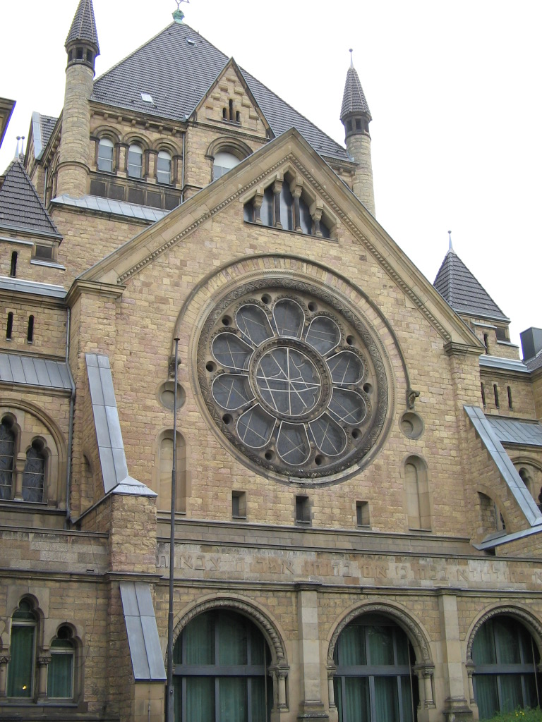 Synagoge in Köln, Roonstraße